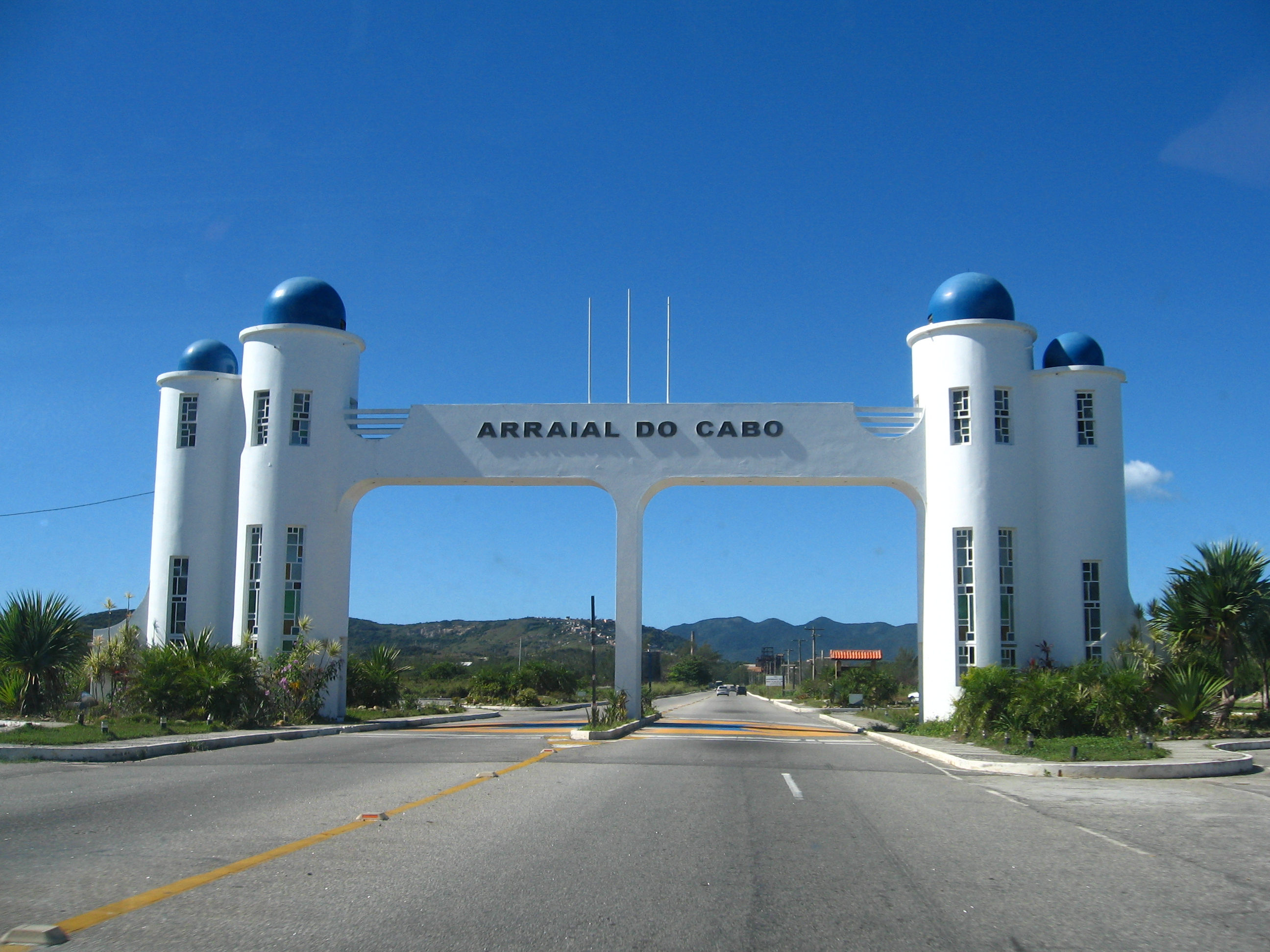 Pórtico de Arraial do Cabo, Rio de Janeiro, Brasil. inaugurado em 02/09/2000.